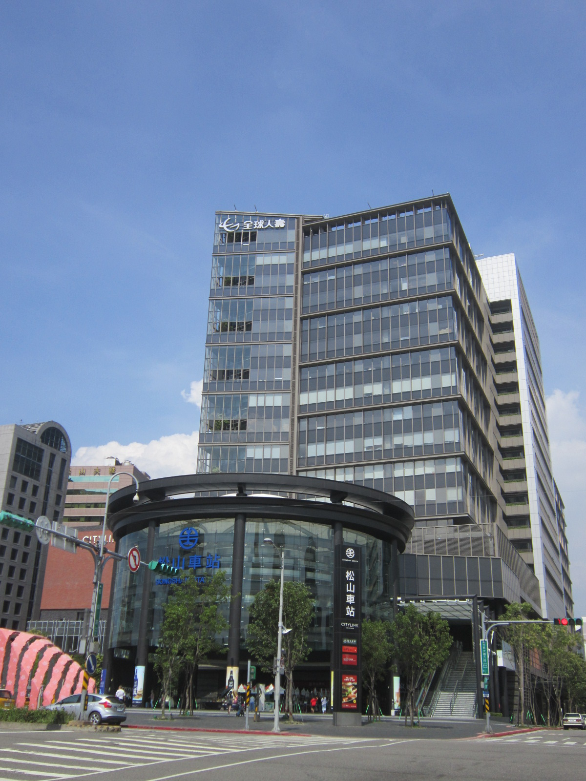 全球人壽總部位於潤泰松山車站大樓B棟16樓。